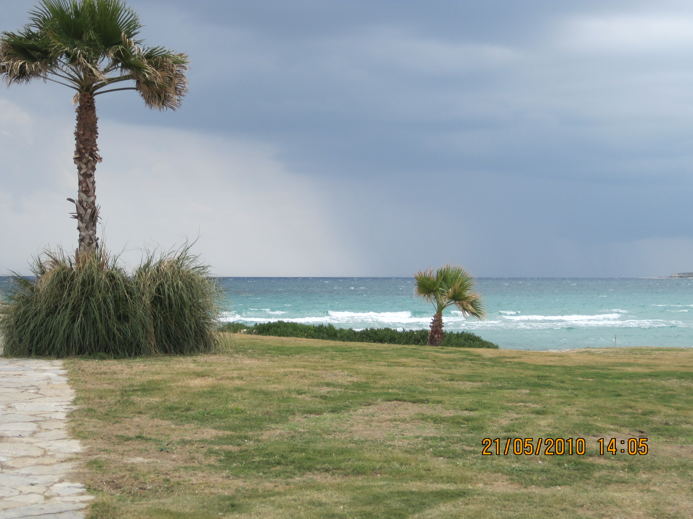 @ Lodos Storm / Sturm / Firtina / طوفان